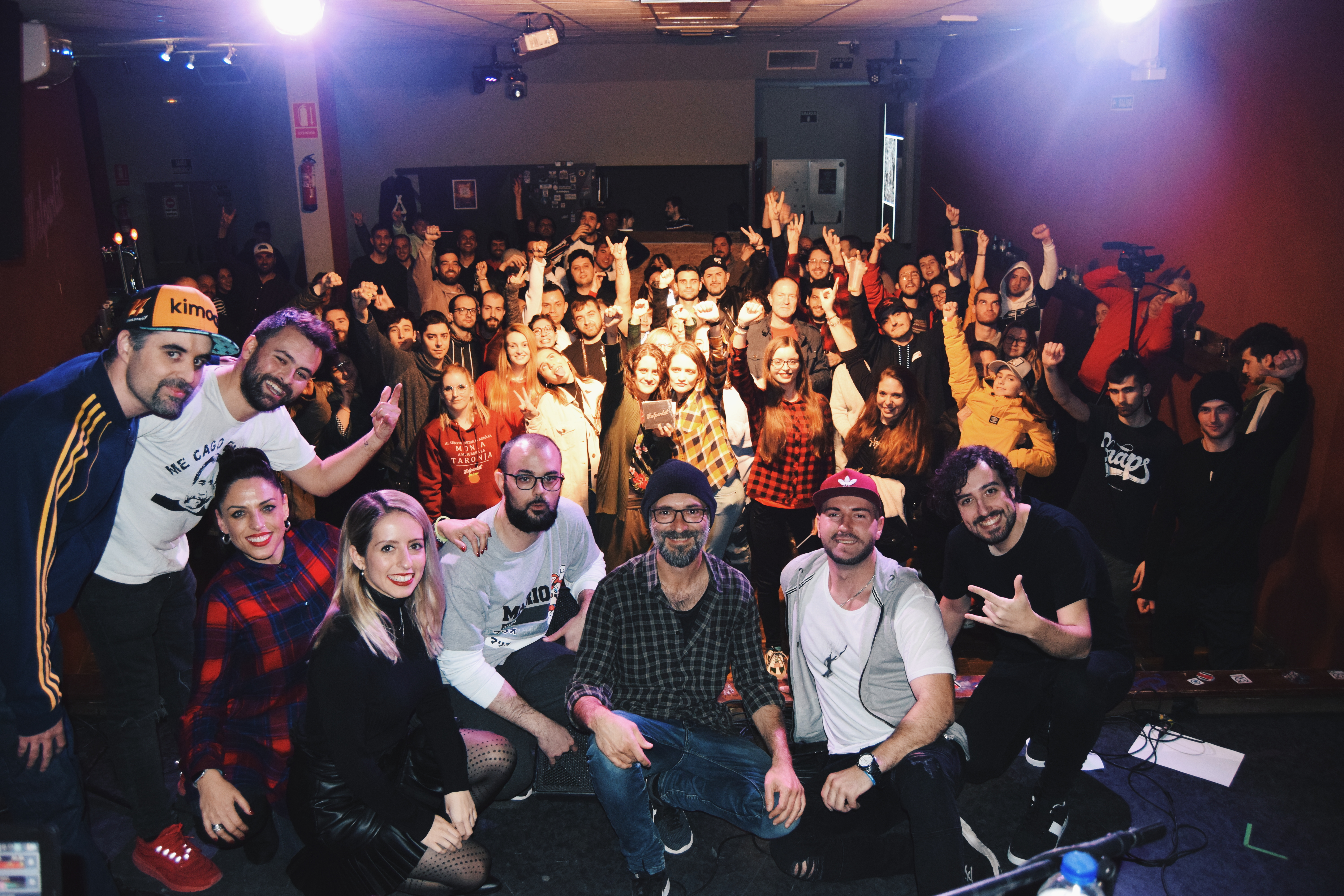 Fotografia de la presentació de Malparlat a la Sala La Burbuja de Castelló de la Plana.